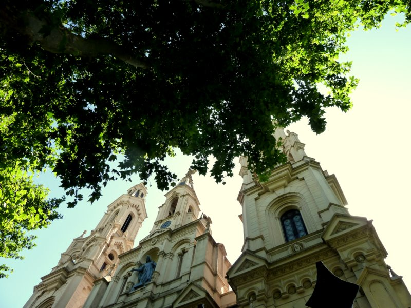 Barracas, Buenos Aires